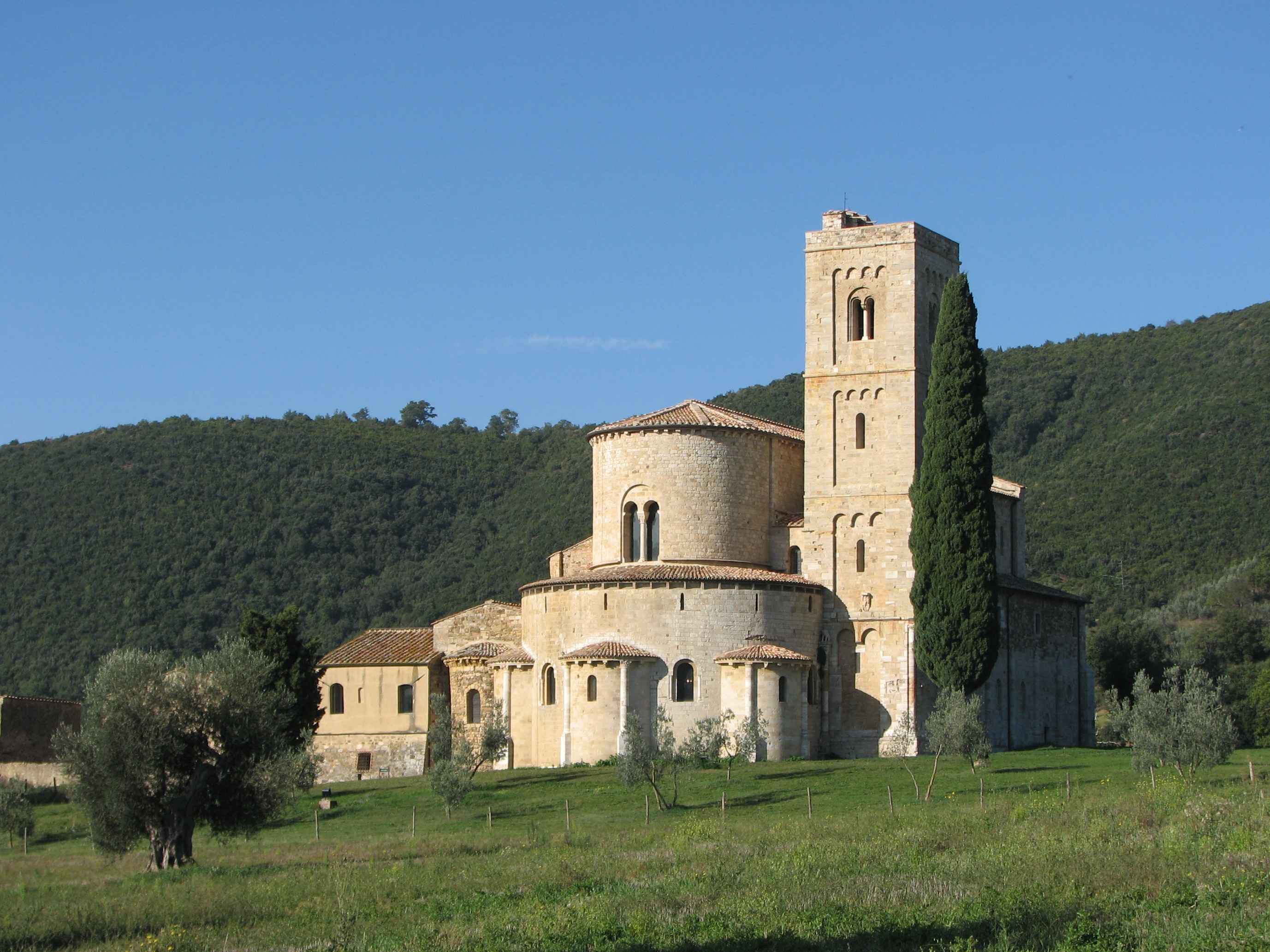 L'Abbazia di Sant'Antimo (Montalcino, Toscana, Italy)